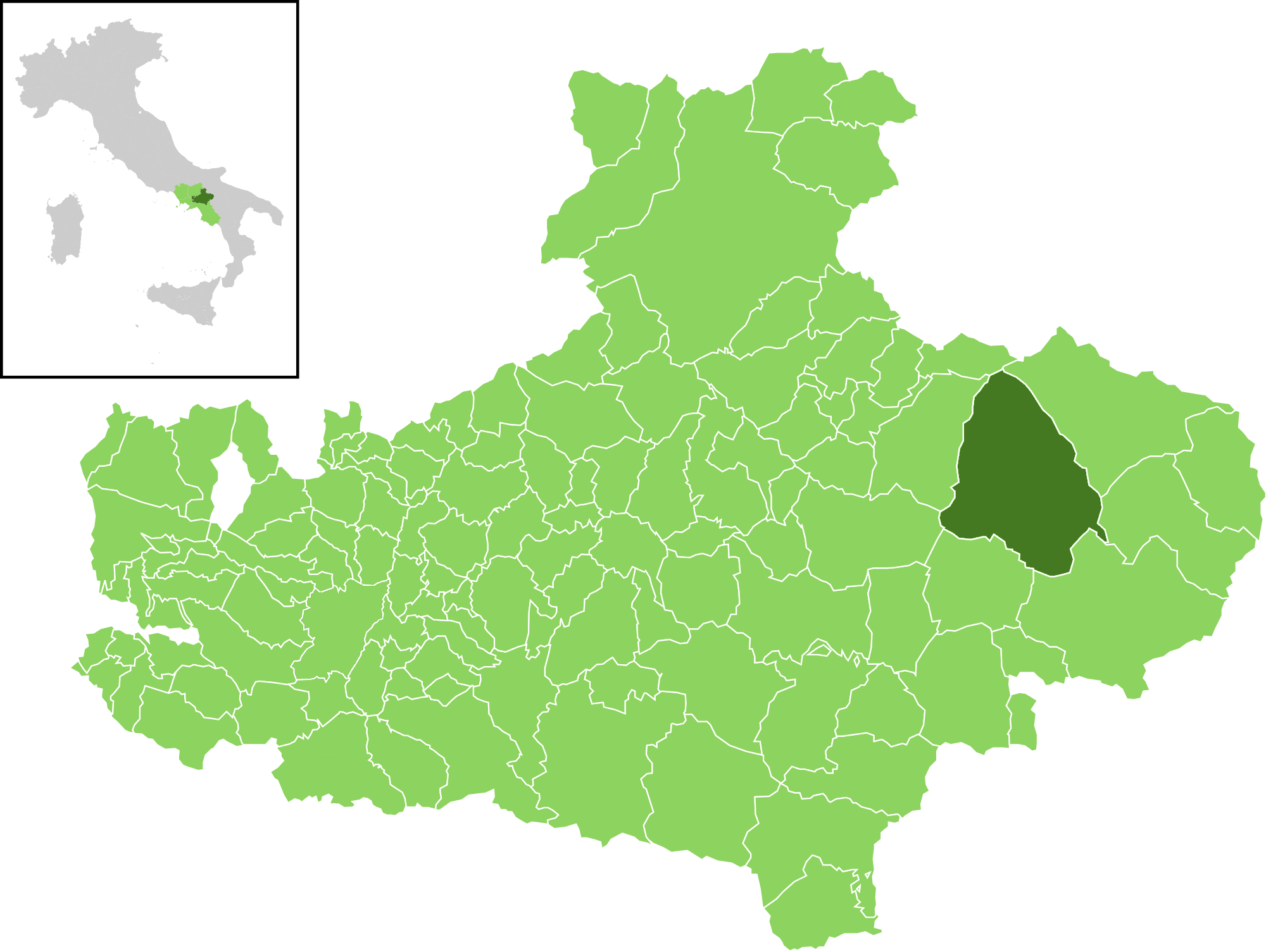 Il comune all'interno della provincia di Avellino